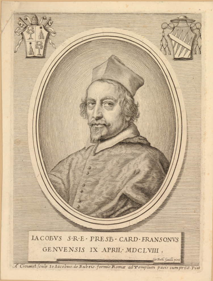 Cardinale Giacomo Franzoni (1612–1697)